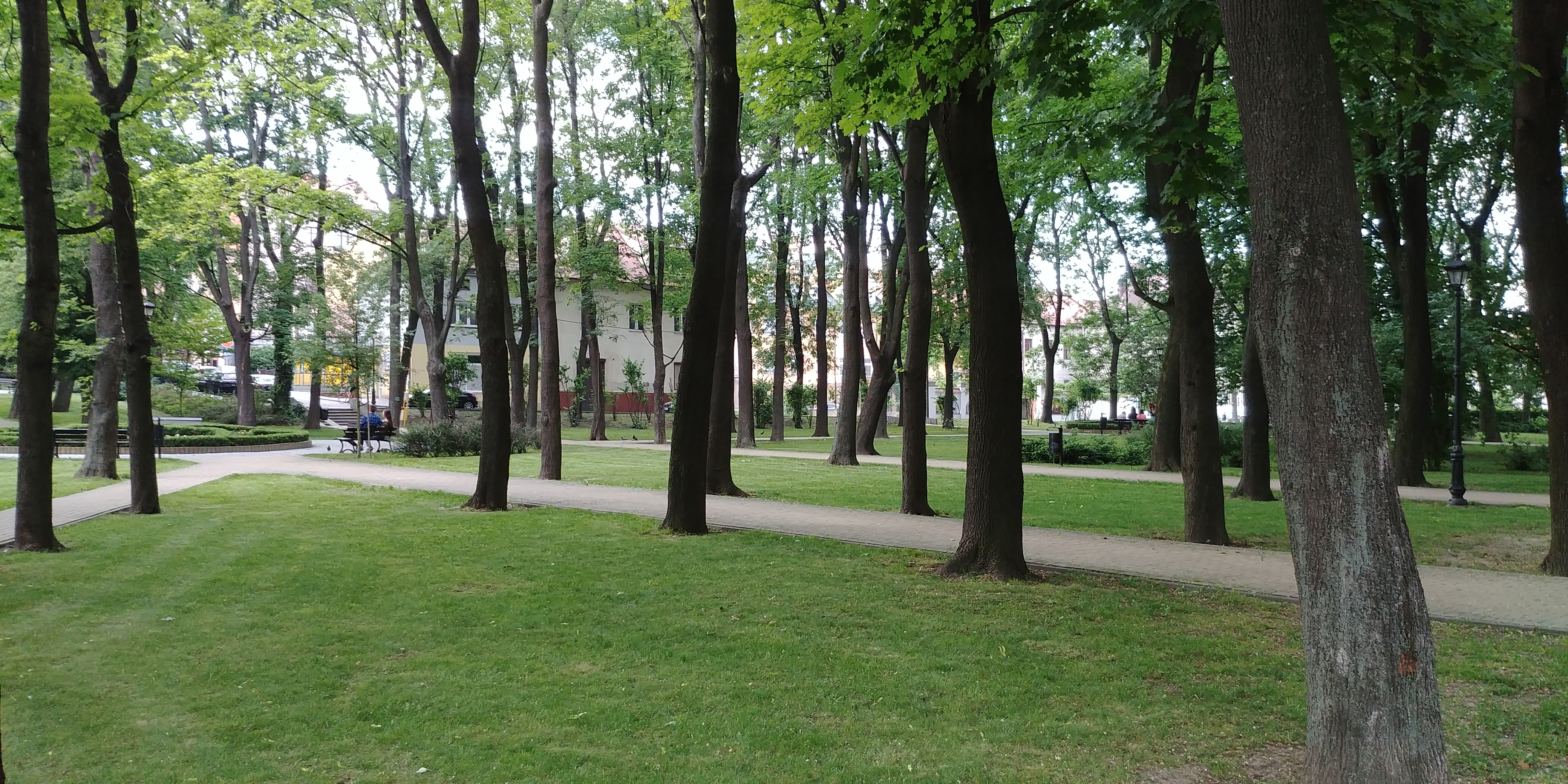 Plac Turka w śródmieściu Bochni.